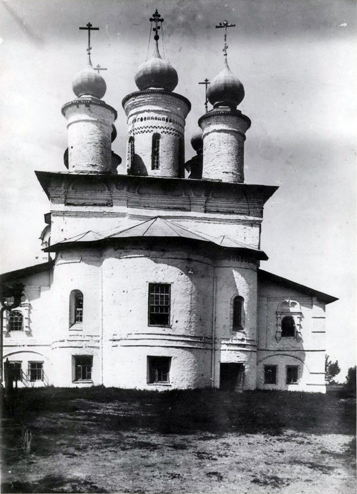 Спасо-Преображенский собор Спасо-Каменного монастыря. фото начала XX века